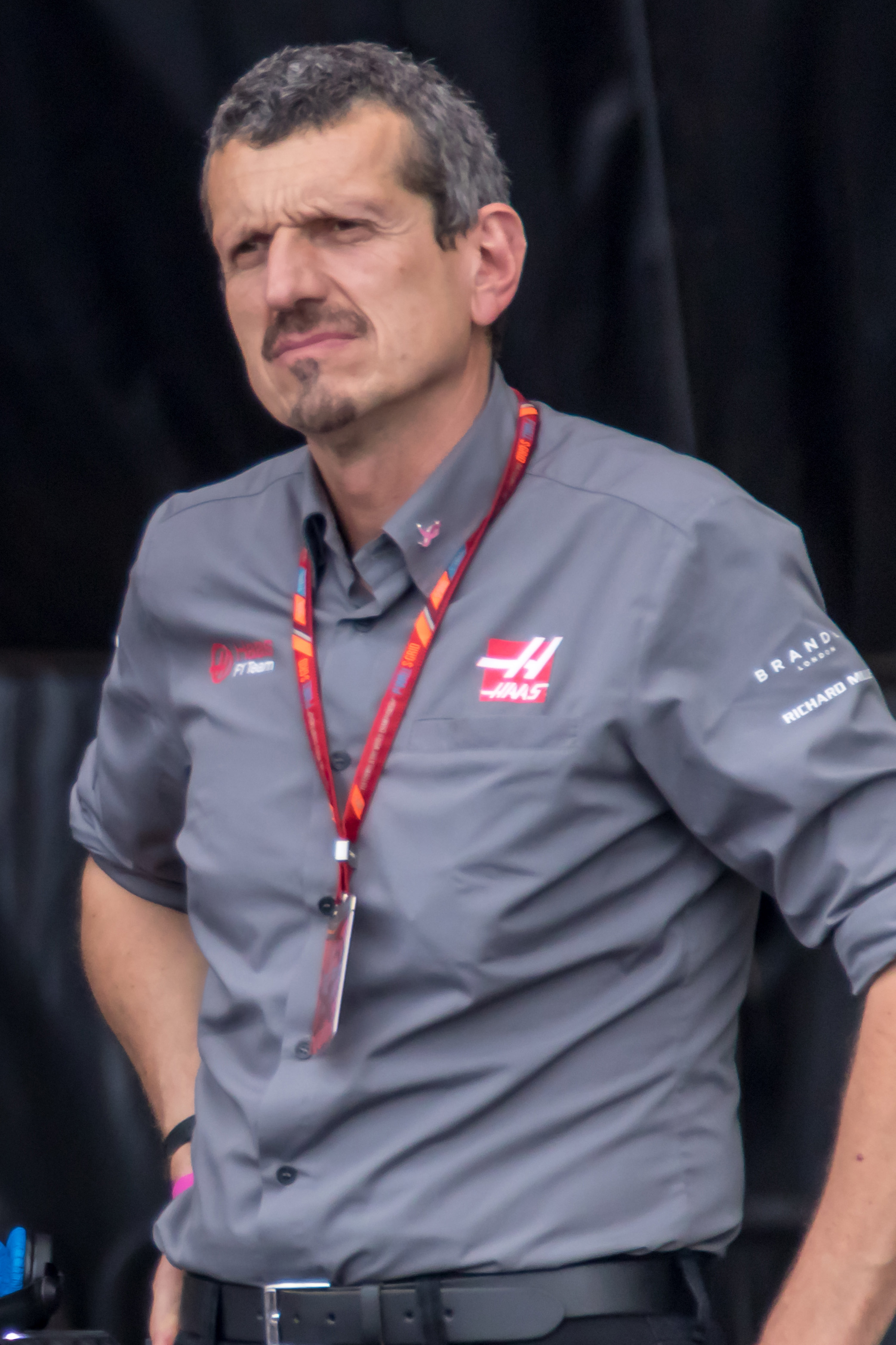 Guenther Steiner